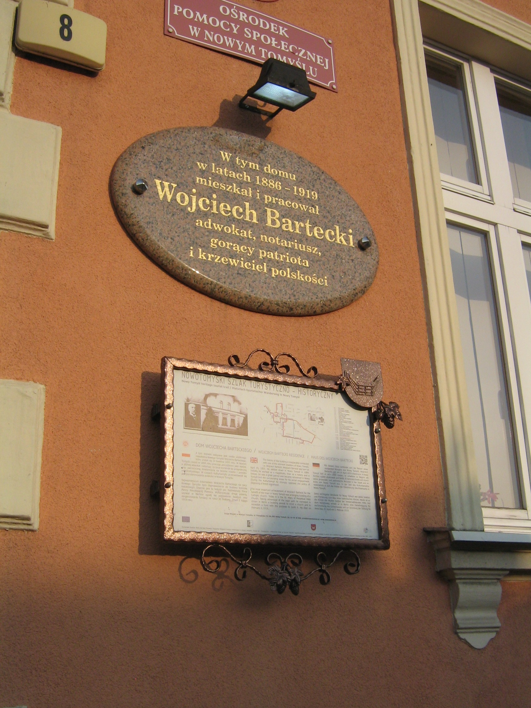 Tablica pamiątkowa ku czci Wojciecha Barteckiego, Nowy Tomyśl